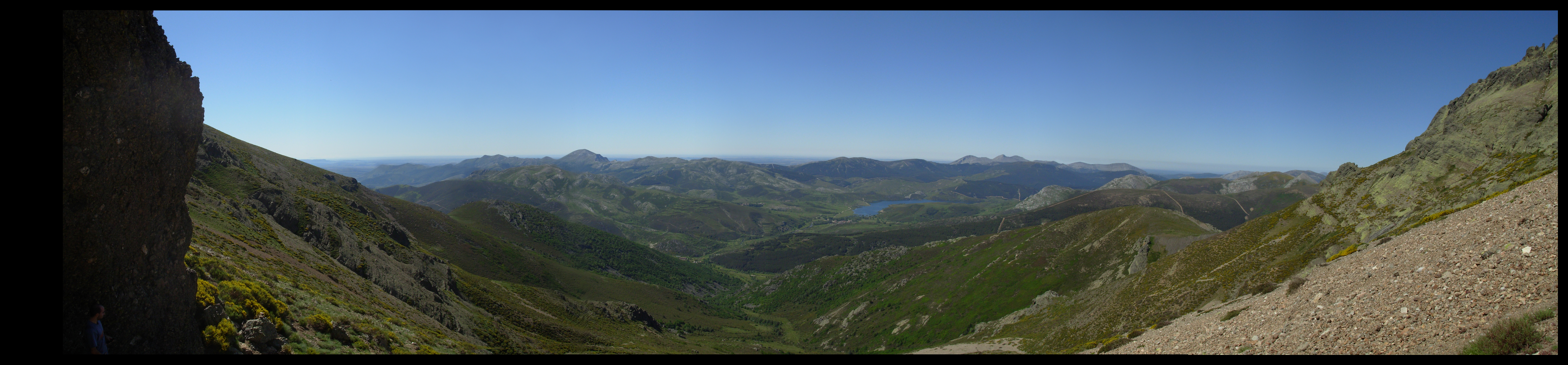 Panorámica desde el Curavacas (Palencia)